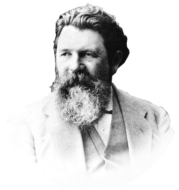 Обработанная фотография